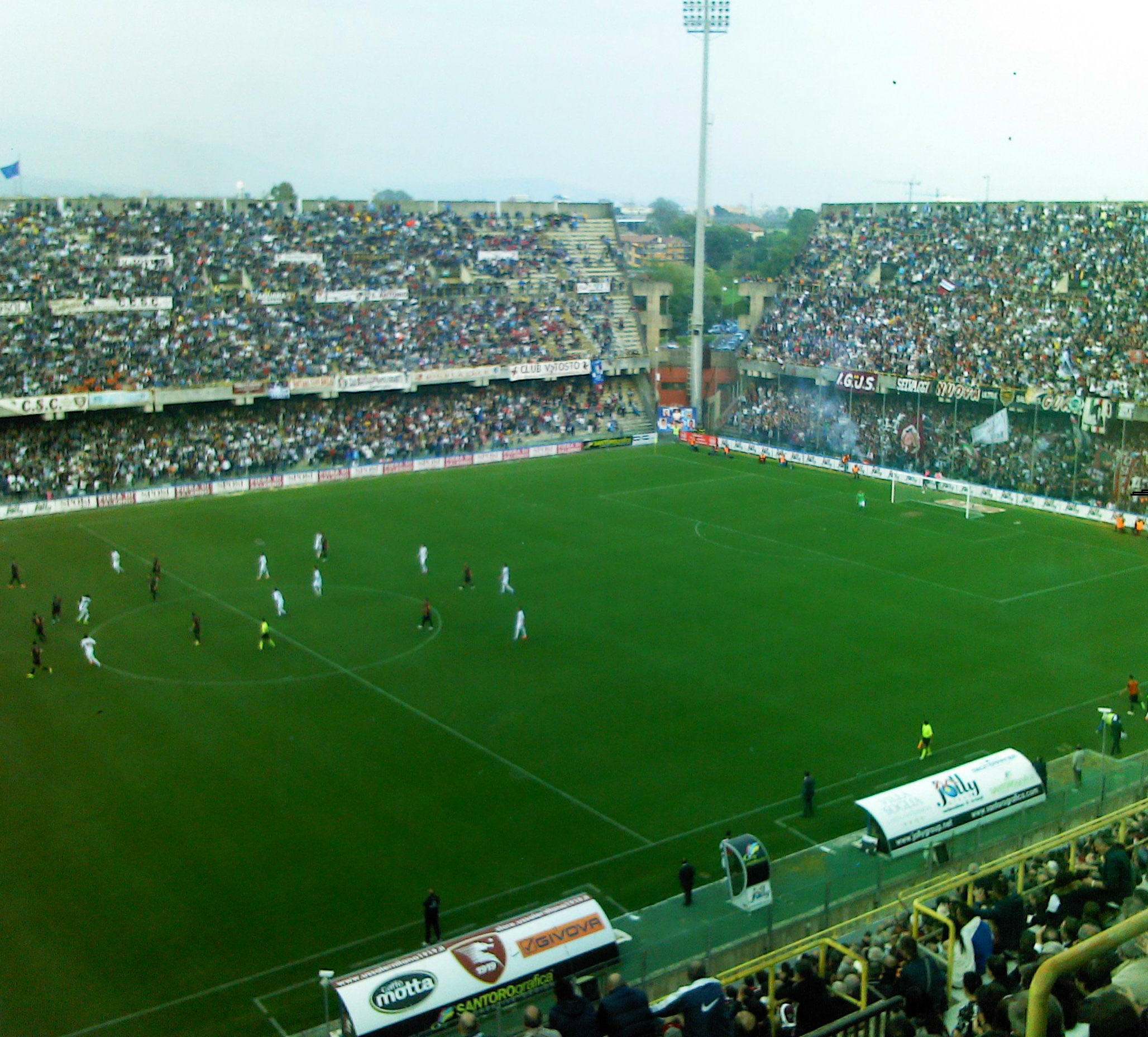 Salernitana-Barletta 25 aprile 2015